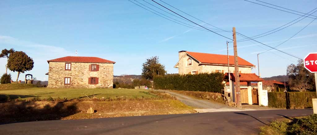 Vista do Salgueiral, Sedes.